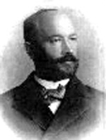 Чайковський Андрій Якович: Портрет Андрія Чайковського